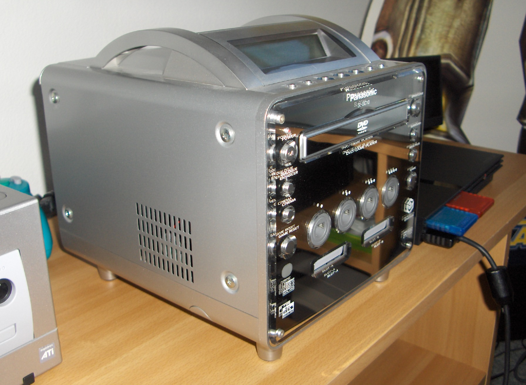 Mijn eigen Panasonic Q.